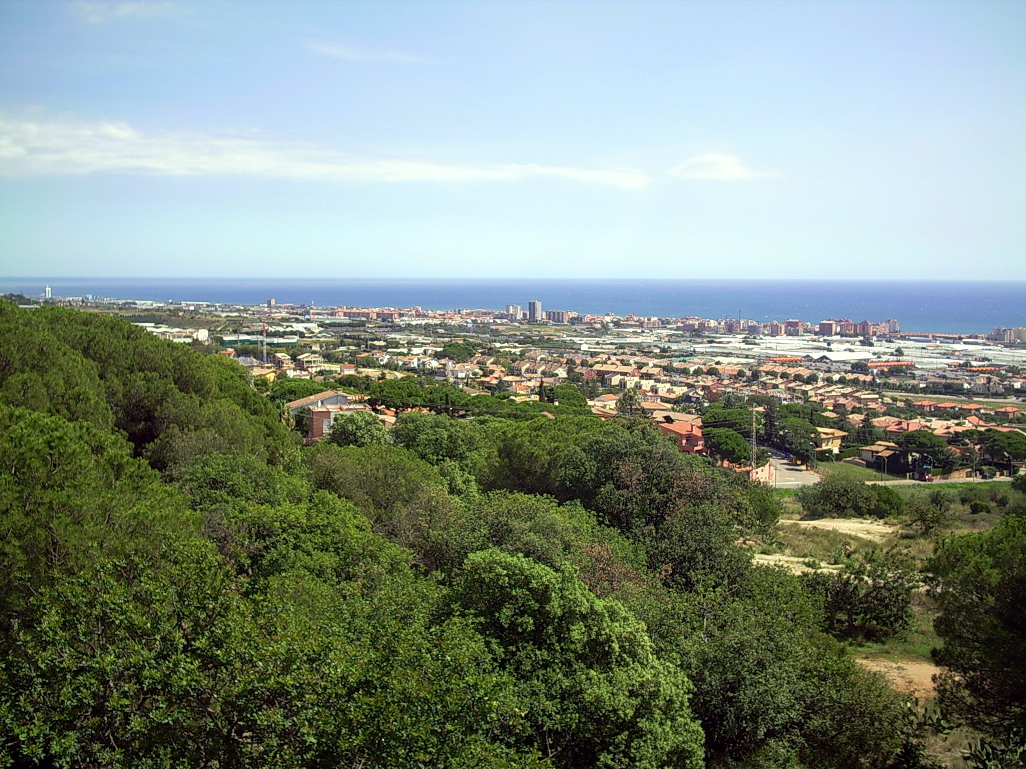 Vista general de Vilassar de Mar, des de La Cisa.